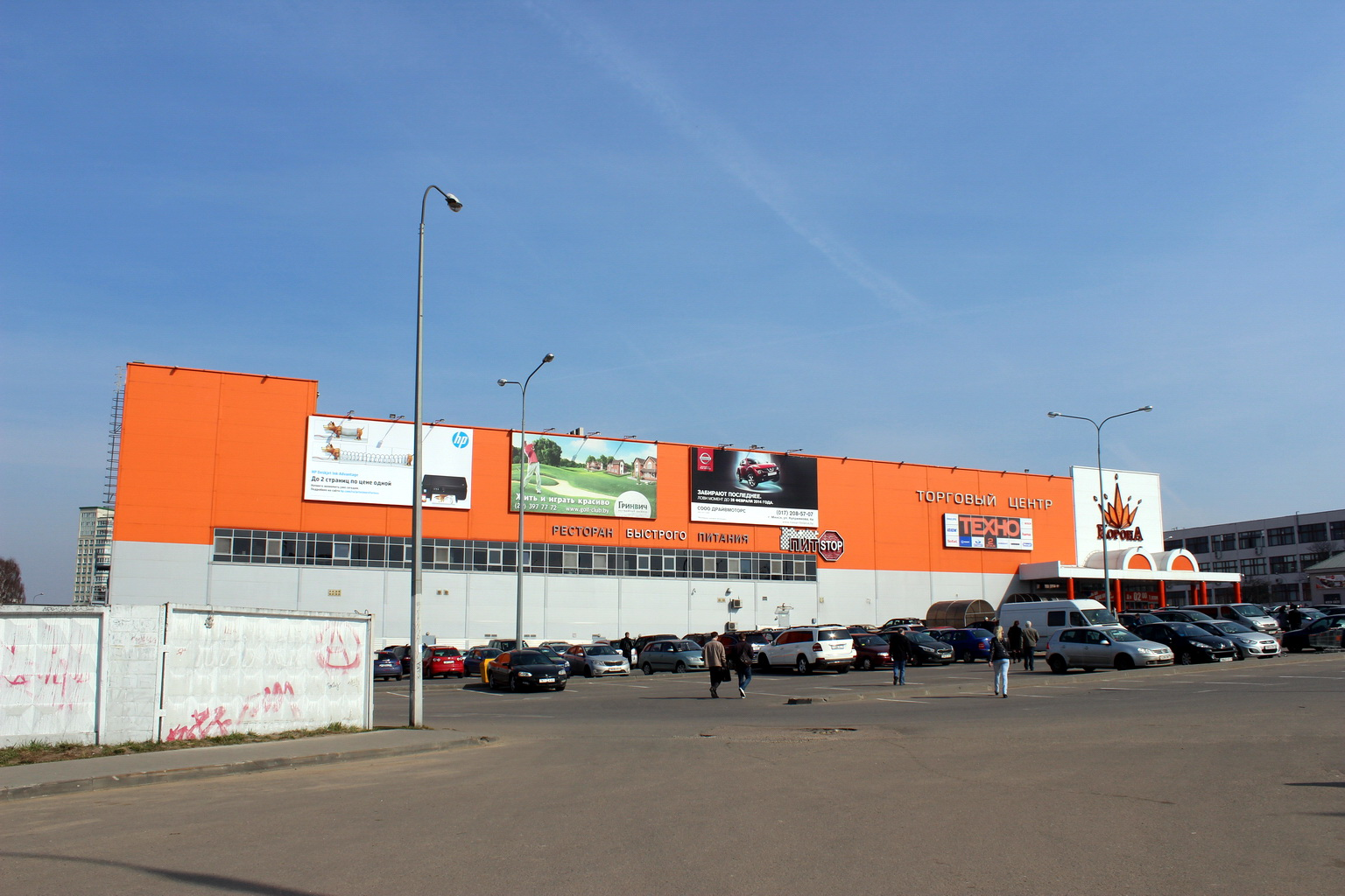 Гандлёвы цэнтр «Карона»